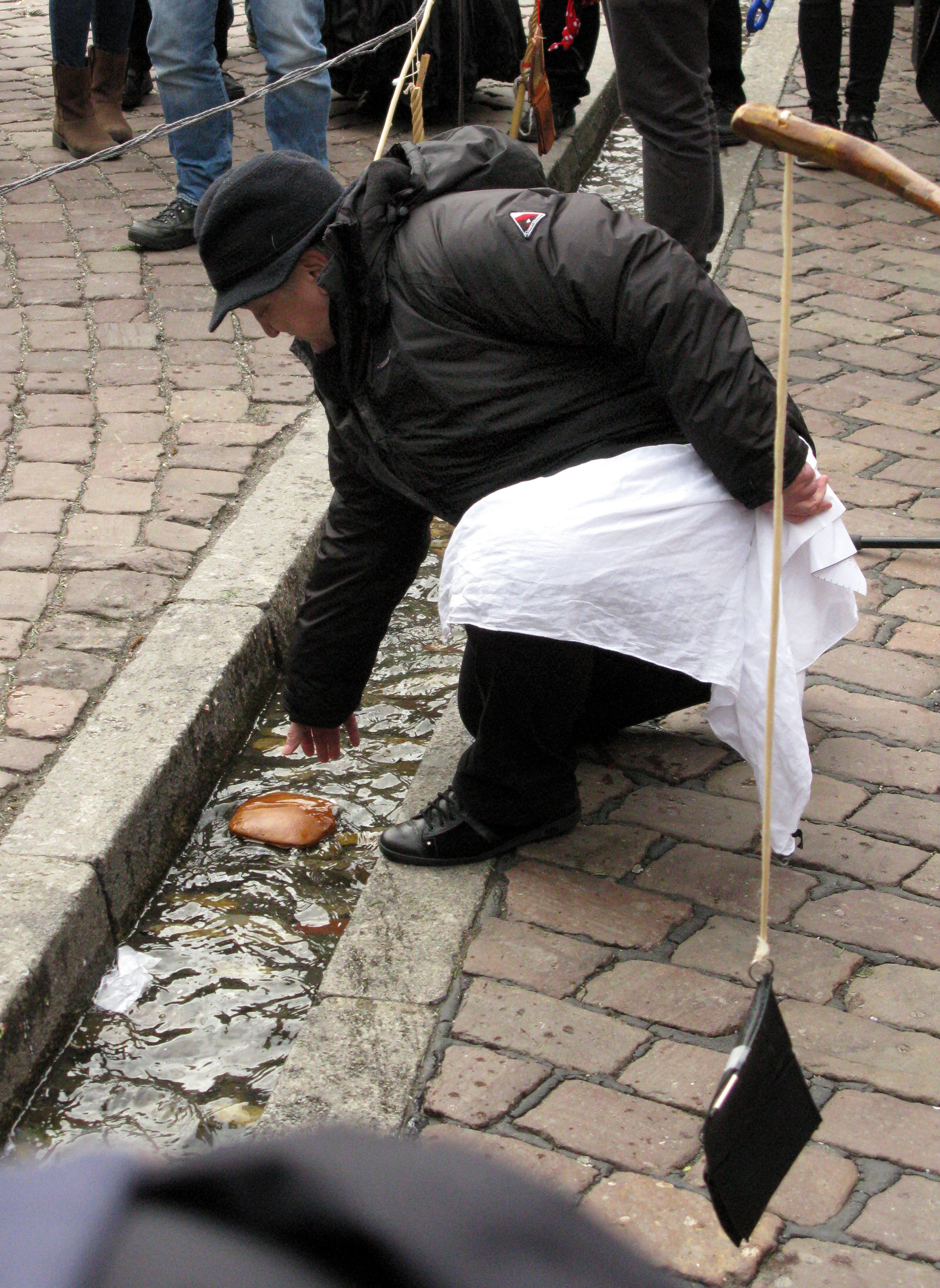 Geldbeutelwäsche der Zunft der Fuhrleute am Aschermittwoch in Freiburg